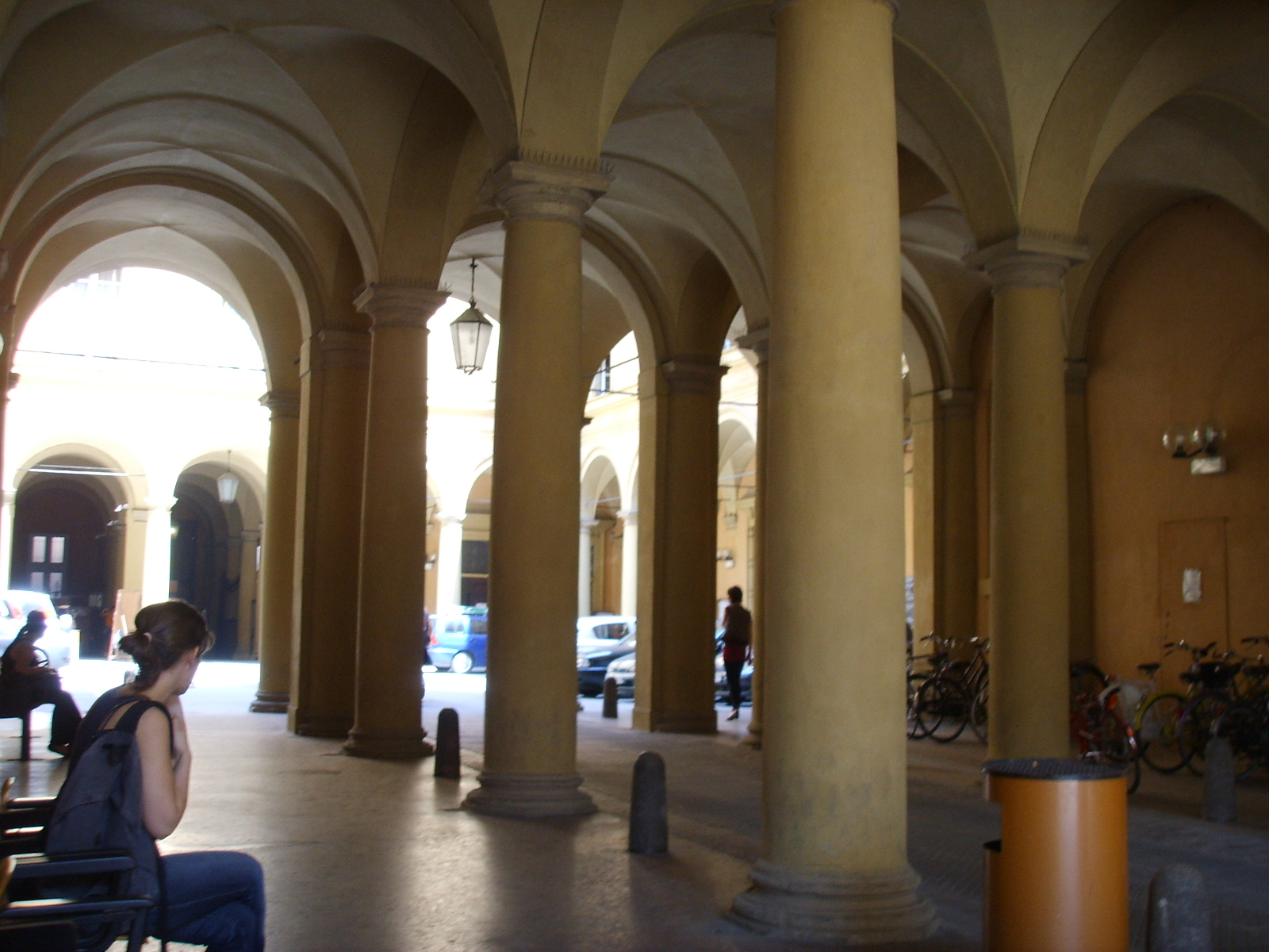 Interno di palazzo Hercolani, oggi Facoltà di Scienze Politiche, Università di Bologna